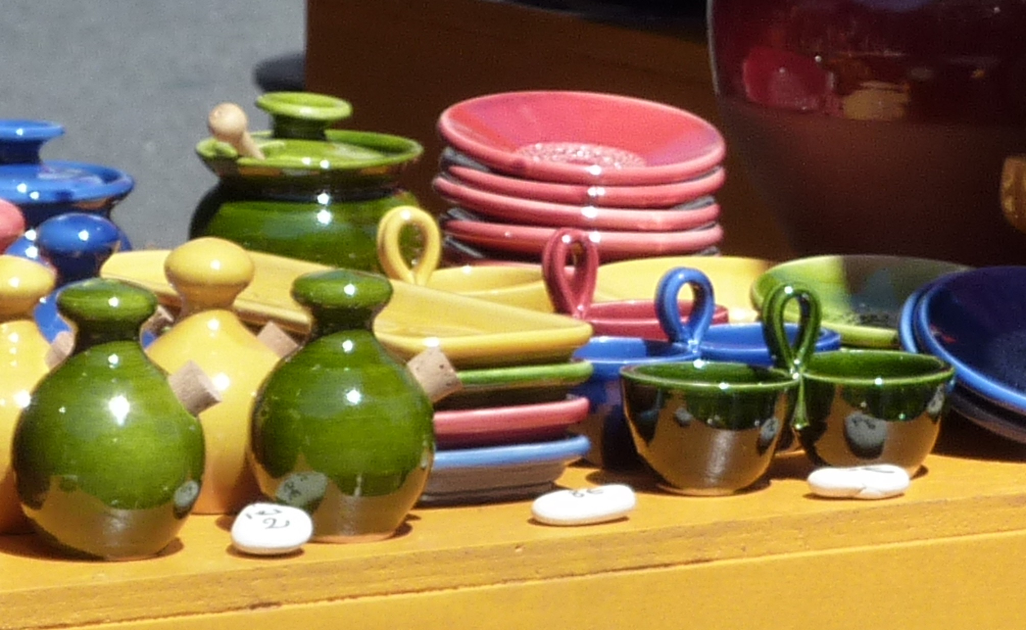 Taraïettes provençales d'Aubagne, Provence.